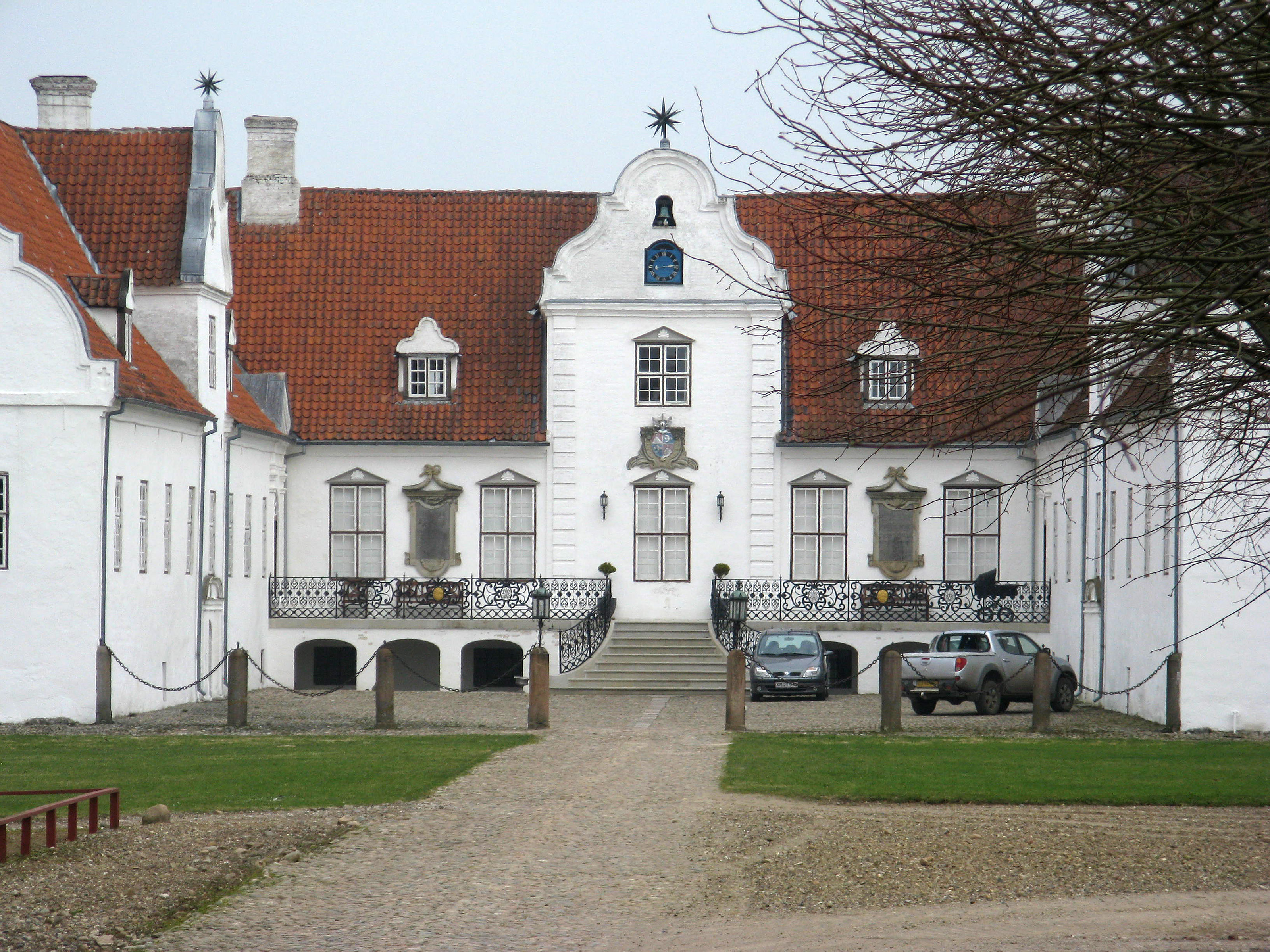 Bidstrup set fra gårdspladsen